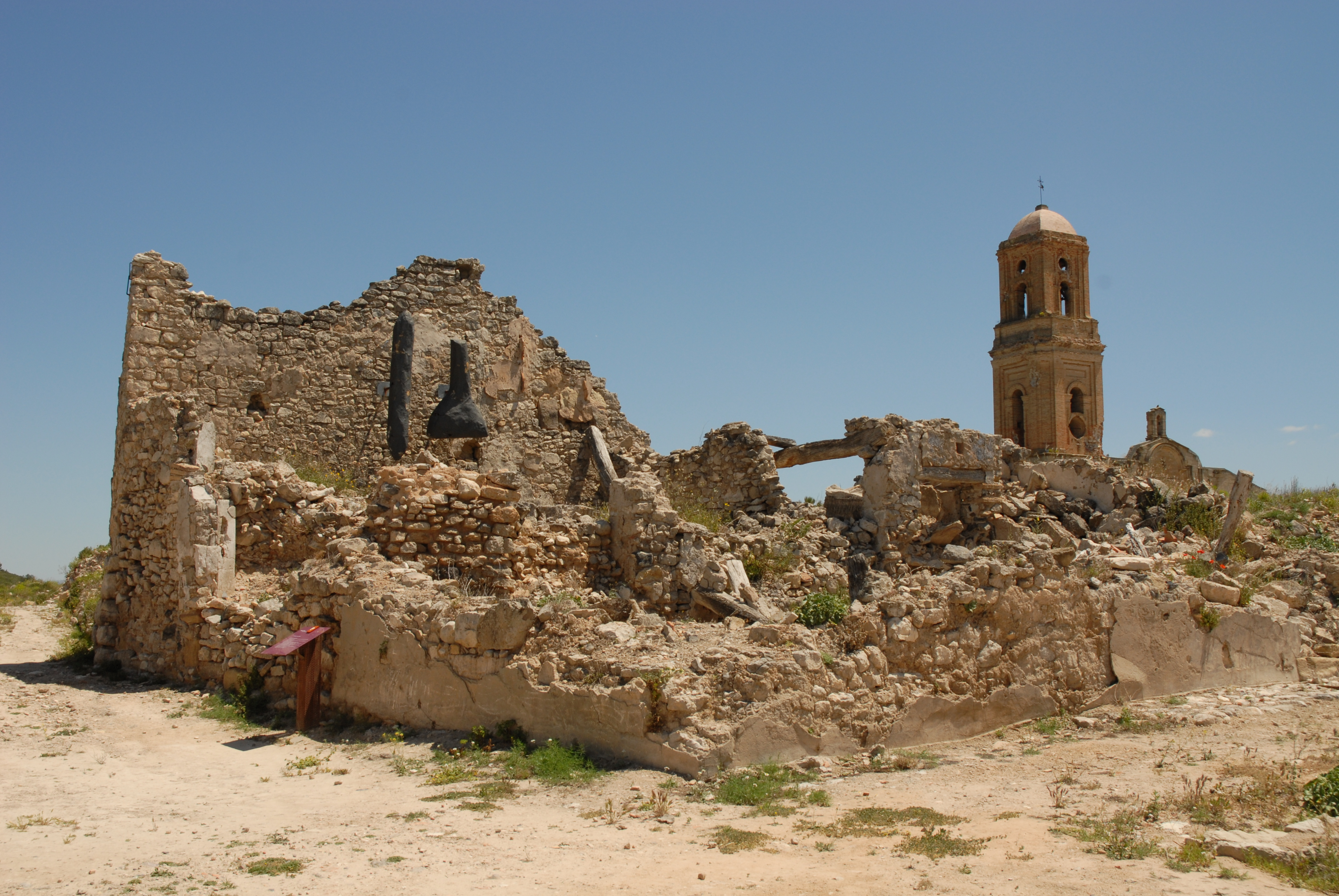 Nucli vell de Corbera d'Ebre